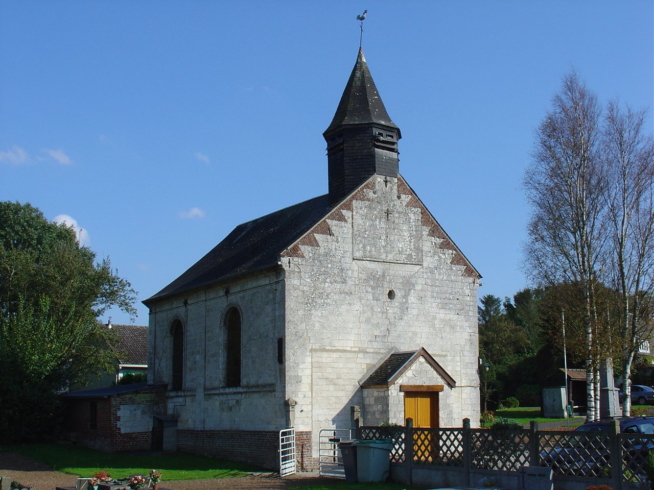 Église de Gouves